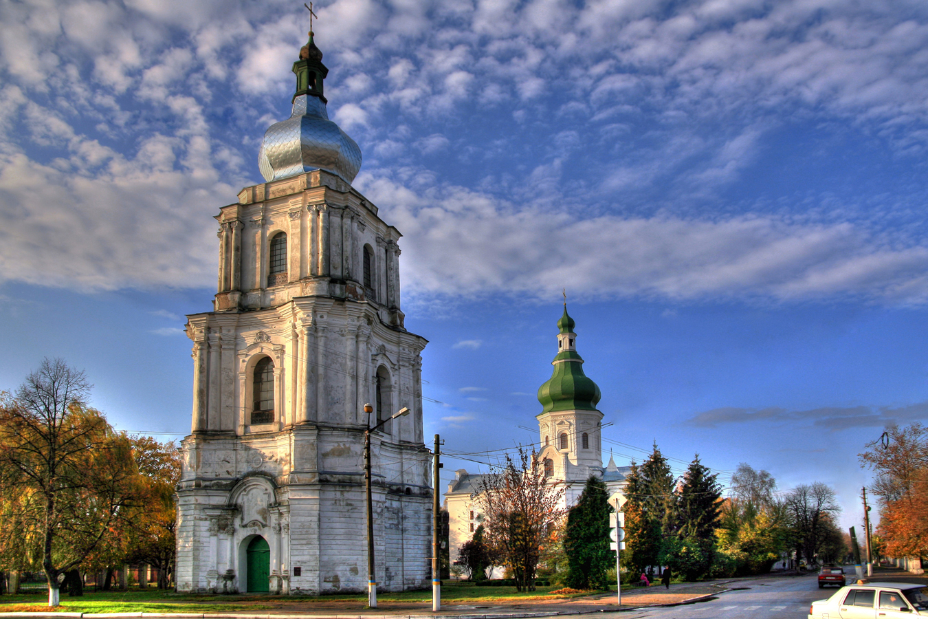 Вознесенський монастир (мур.), Переяслав-Хмельницький, вул. Г.Сковороди, 54